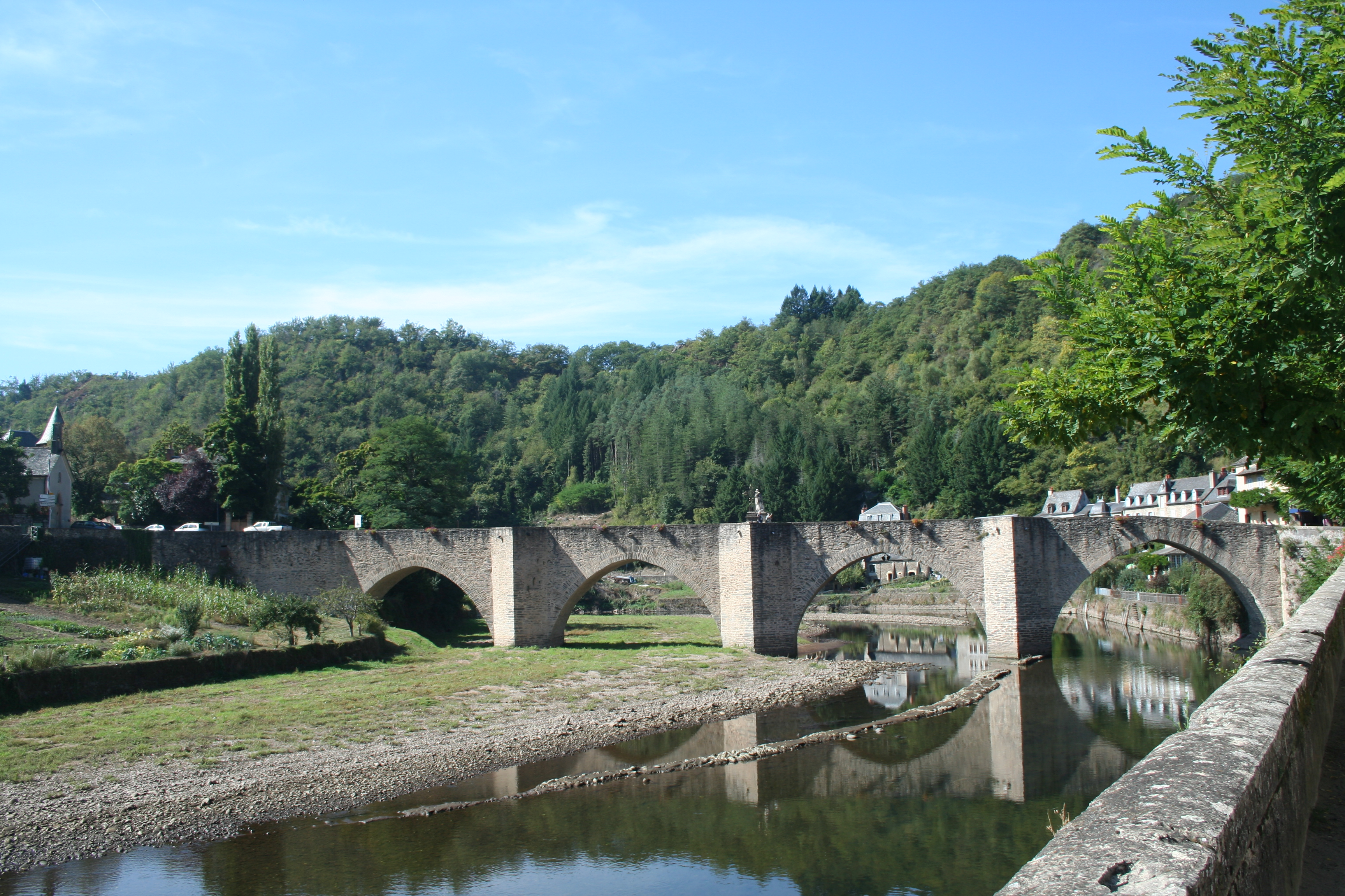 Estaing (Aveyron) - pont vieux.